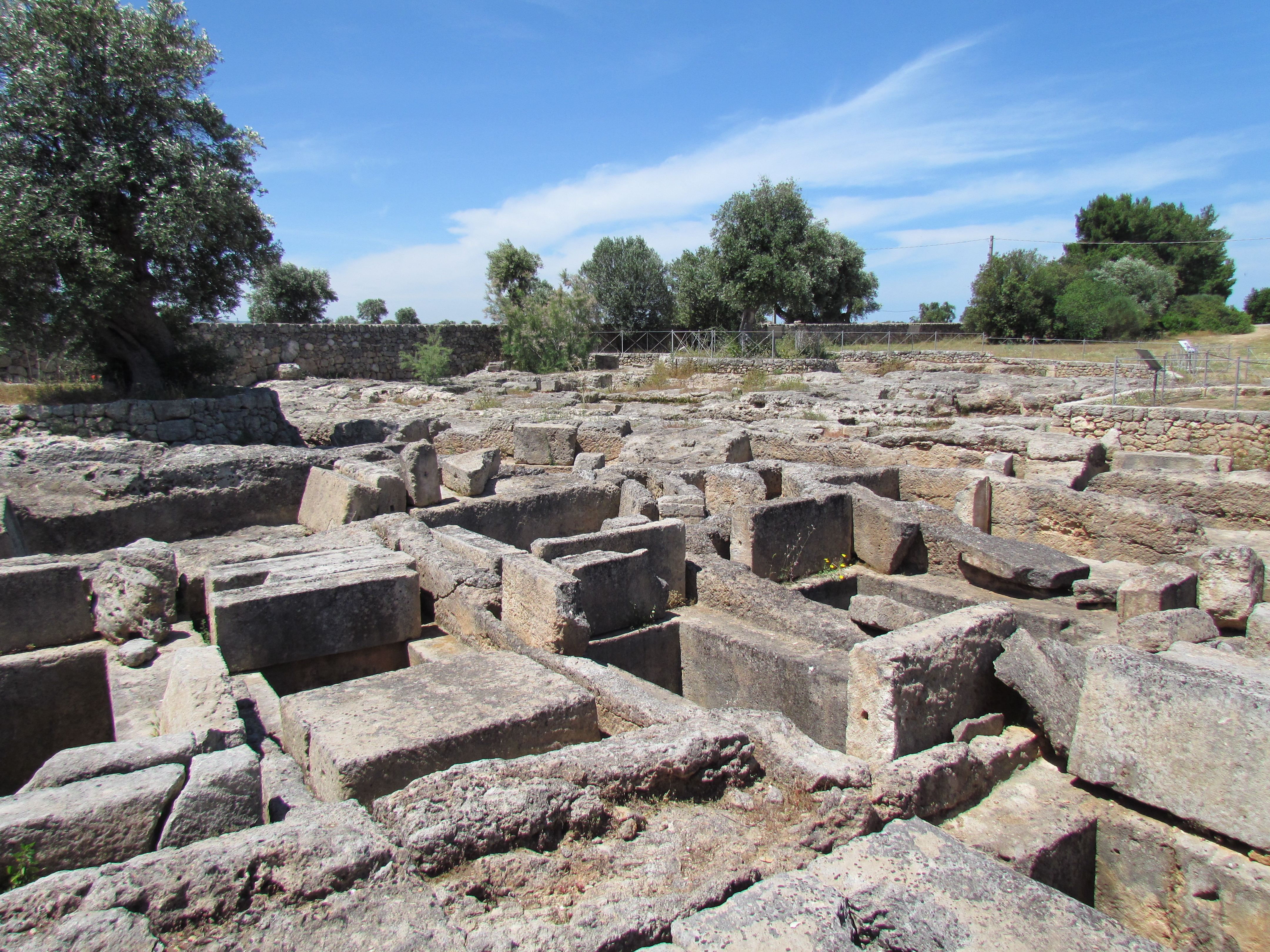 Mesapsko pokopališče v Egnatii (Gnatii), Apulija. Italija.